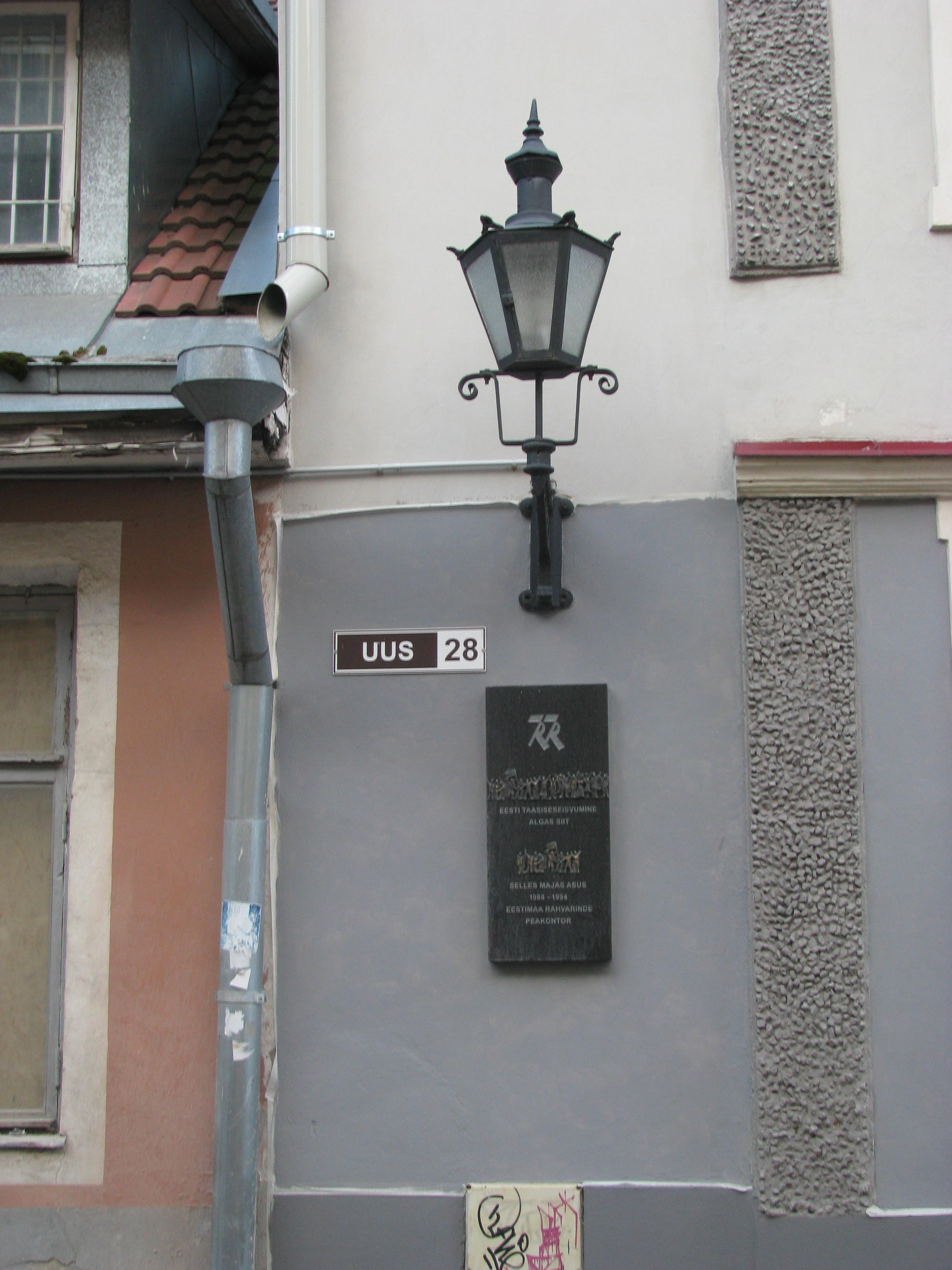 Rahvarinde peakontori mälestustahvel Uus tn 28 hoonel Tallinnas